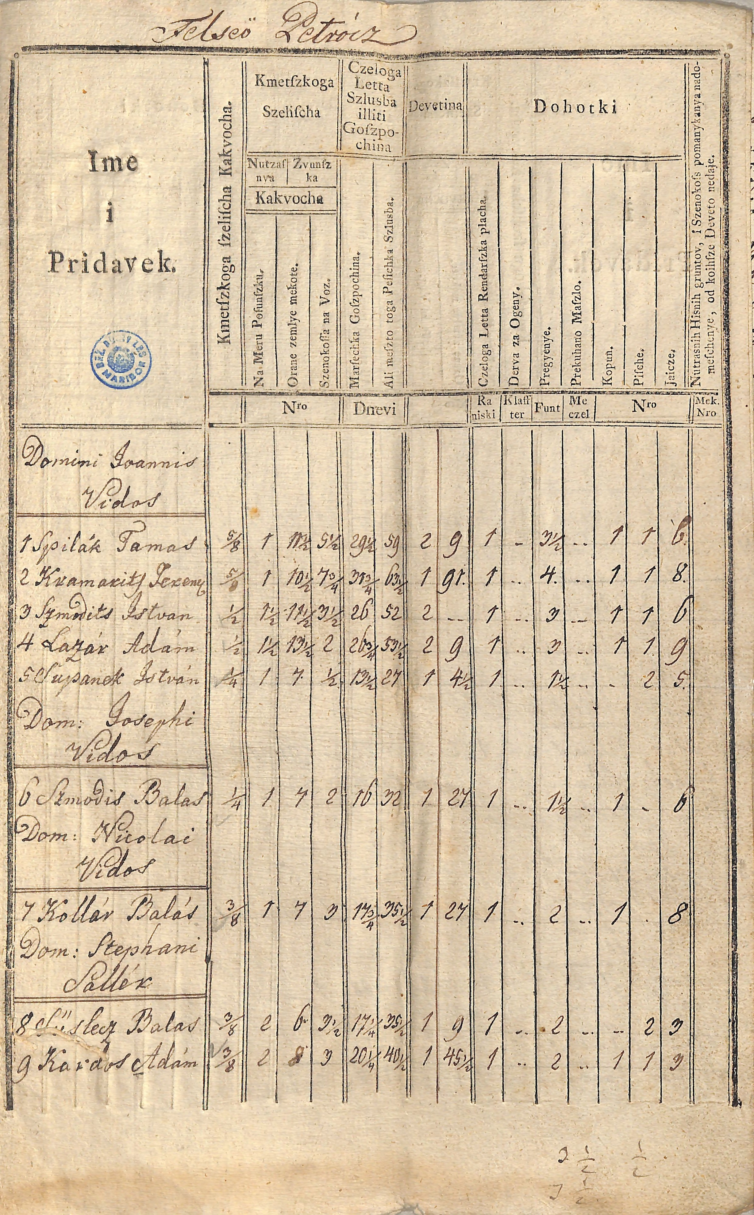 Urbarialna tabela iz terezijanskega urbarja za naselje Gornji Petrovci leta 1767